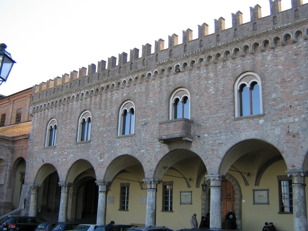 Palazzo Ordelaffi, Bertinoro (FC) Italy